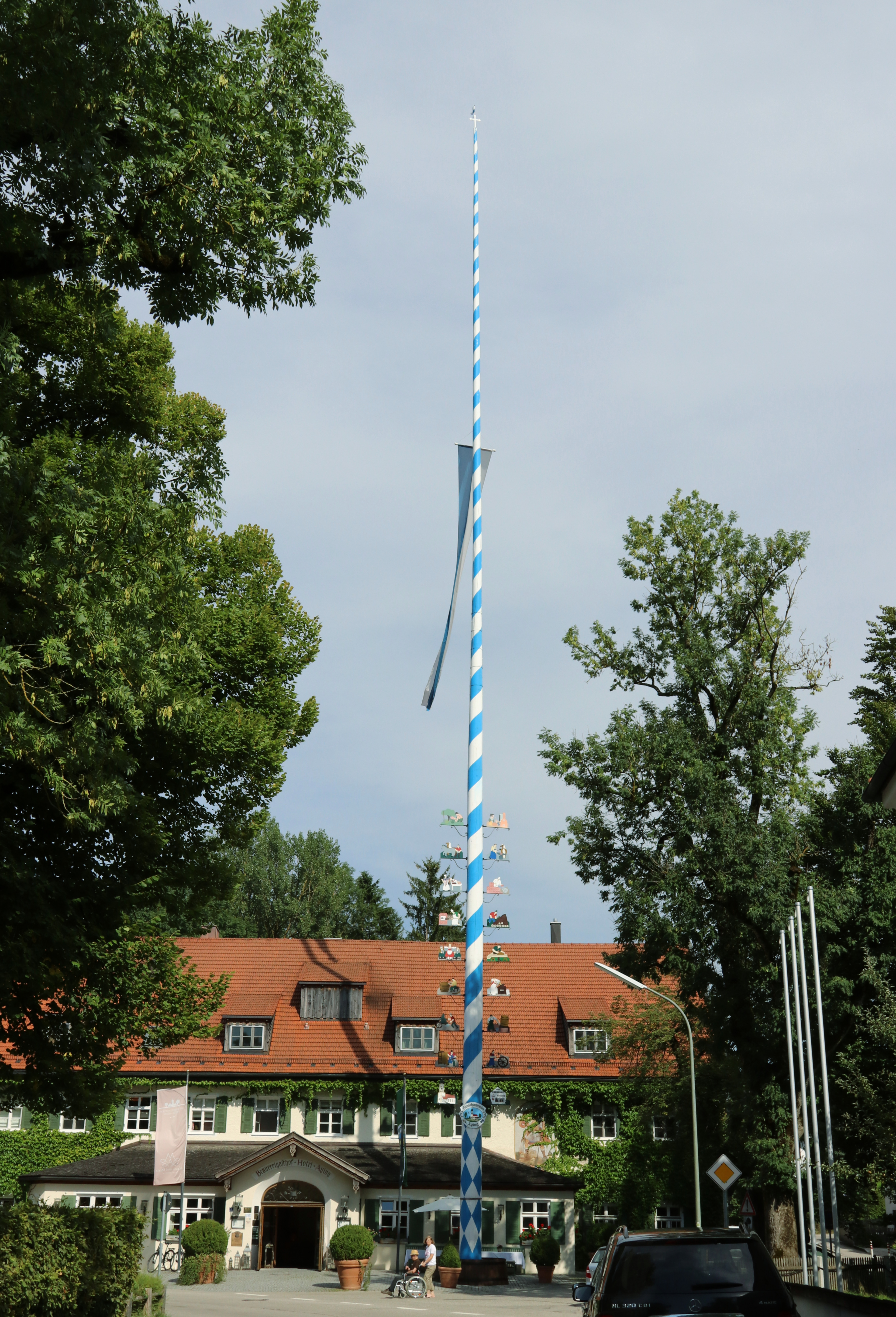 Höchster Maibaum Europas in Aying in Oberbayern